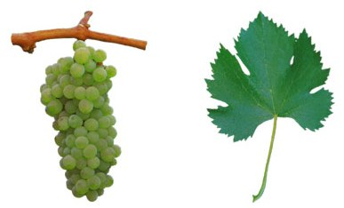 Blatt und Traube der Weißweinsorte 'Antao_Vaz'